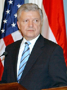 Ferenc Somogyi, Hungarian ambassador to the US (2007-2009)